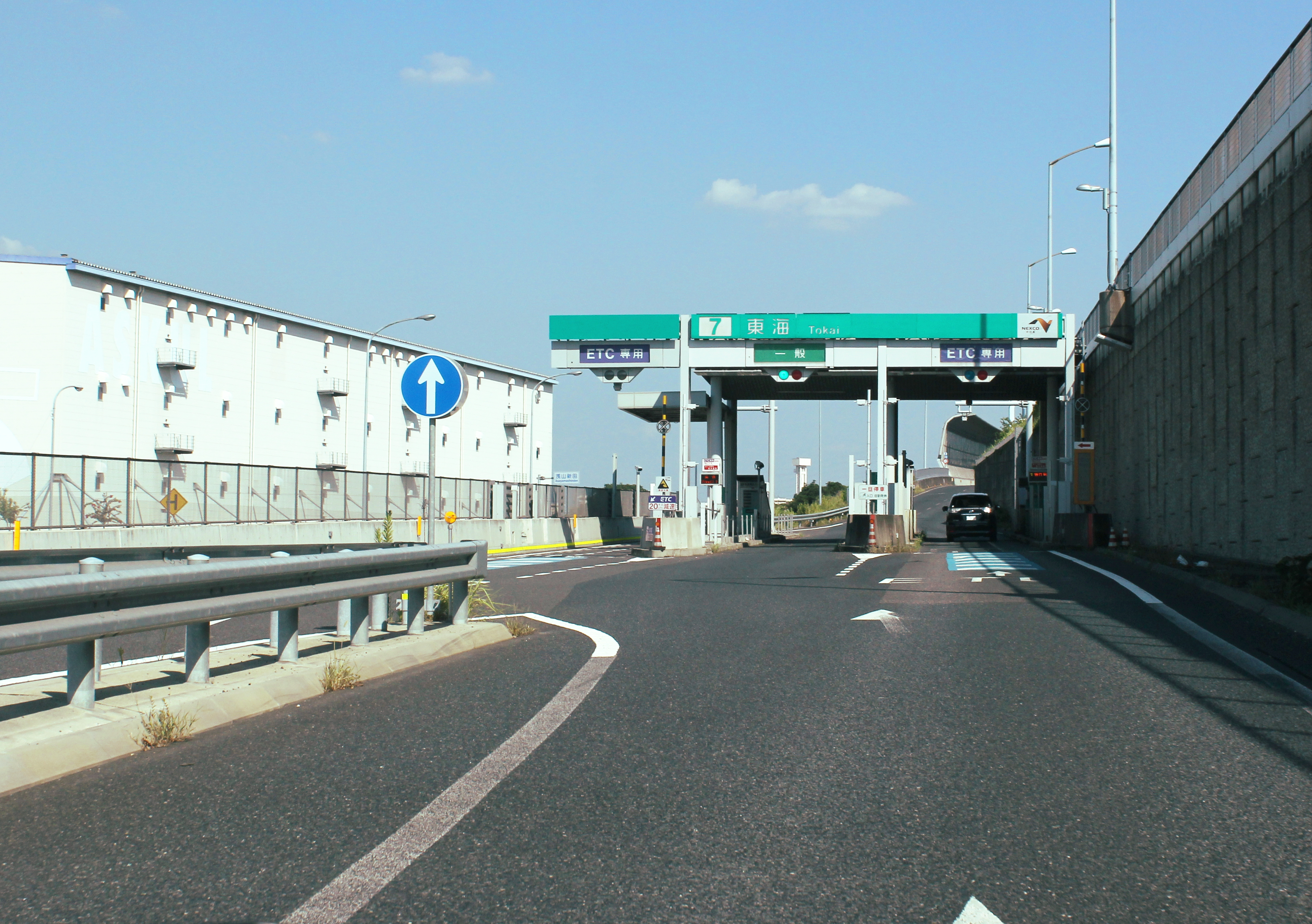 伊勢湾岸自動車道 東海IC豊田方面入口